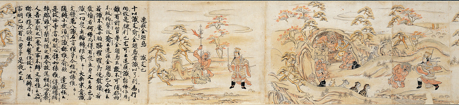 10e section du Jūni innen emaki conservé au musée Nazu.